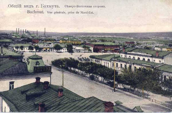 View on Bakhmut, Ukraine